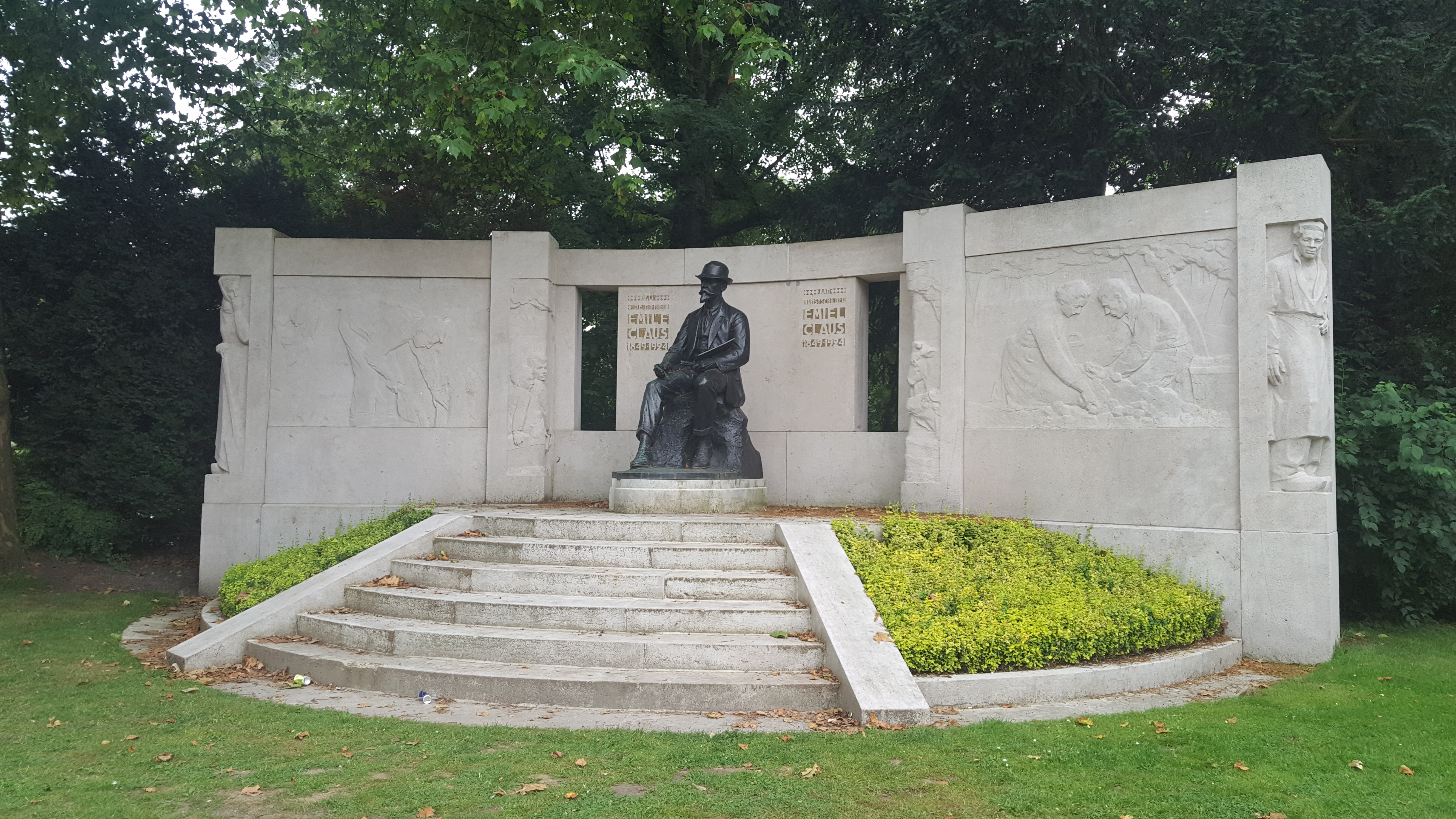 Emile Claus in Citadelpark, Gent, België